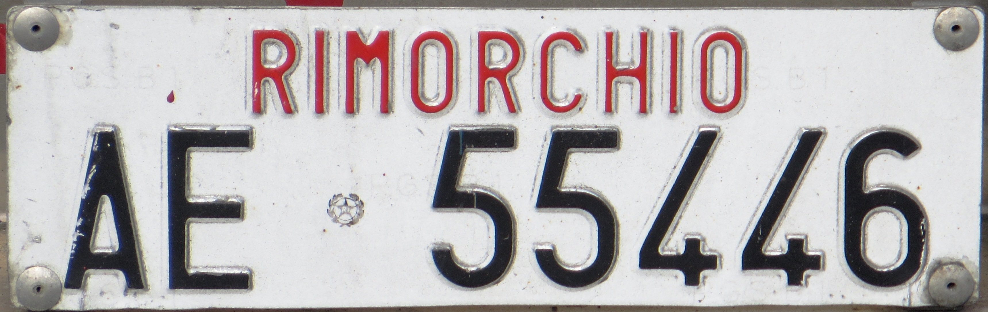 trailer plaat